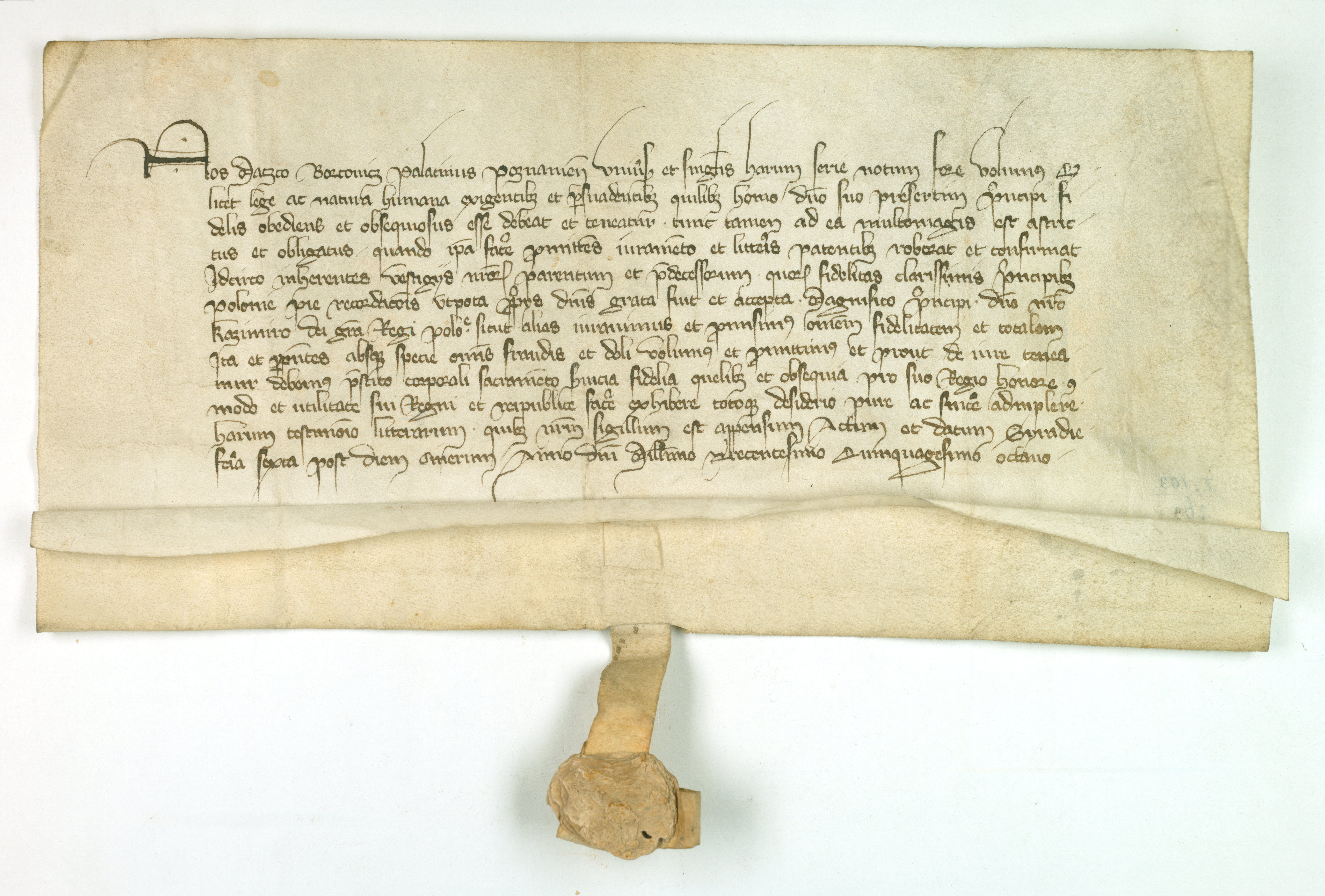 Maćko Borkowic, woj. poznański, przyrzeka dochowywać wierności Kazimierzowi Wielkiemu, królowi polskiemu.